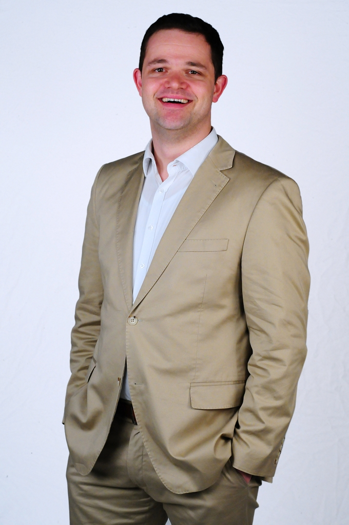 Michael Dahmen 2015, Quelle: privat